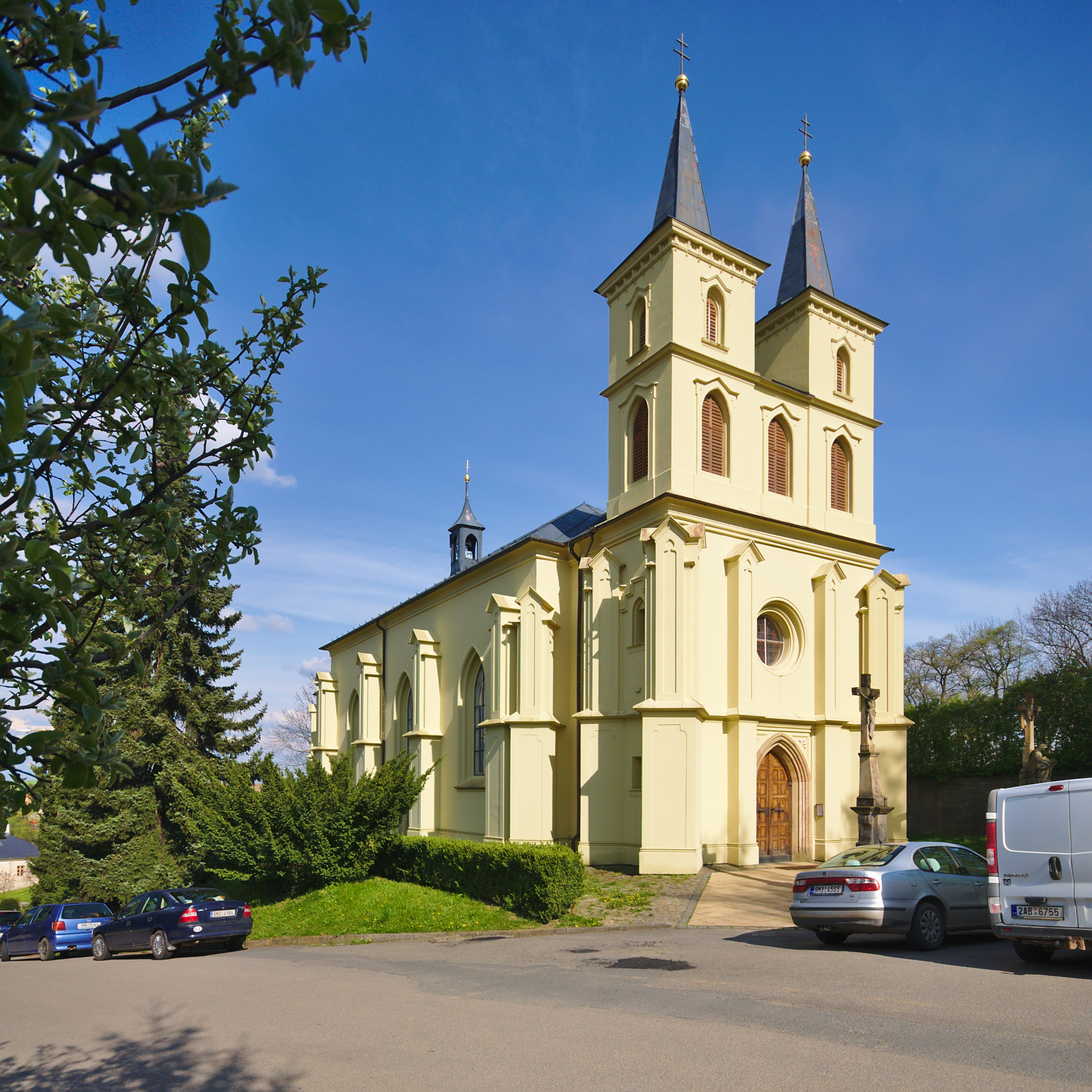 Kostel svatého Michala, Otaslavice, okres Prostějov